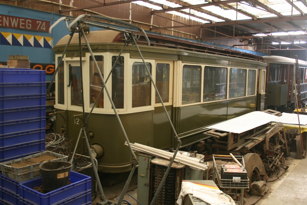 Motorwagen "NBM 12" bij de Electrische Museumtramlijn Amsterdam, Remise Karperweg; 20 september 2012. Foto: Erik Swierstra.